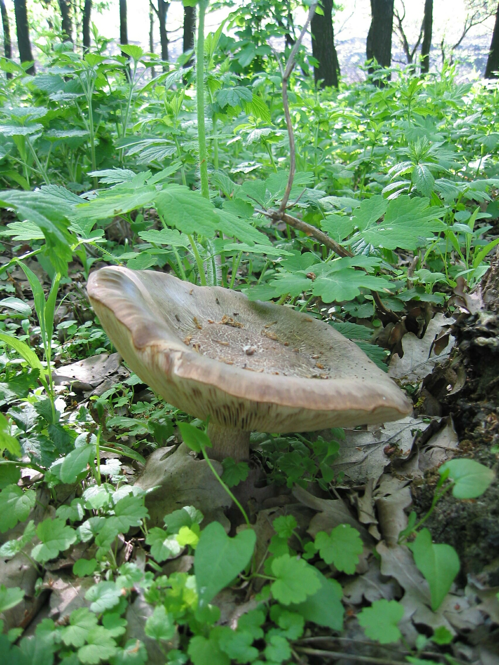 Гриб в Донецке